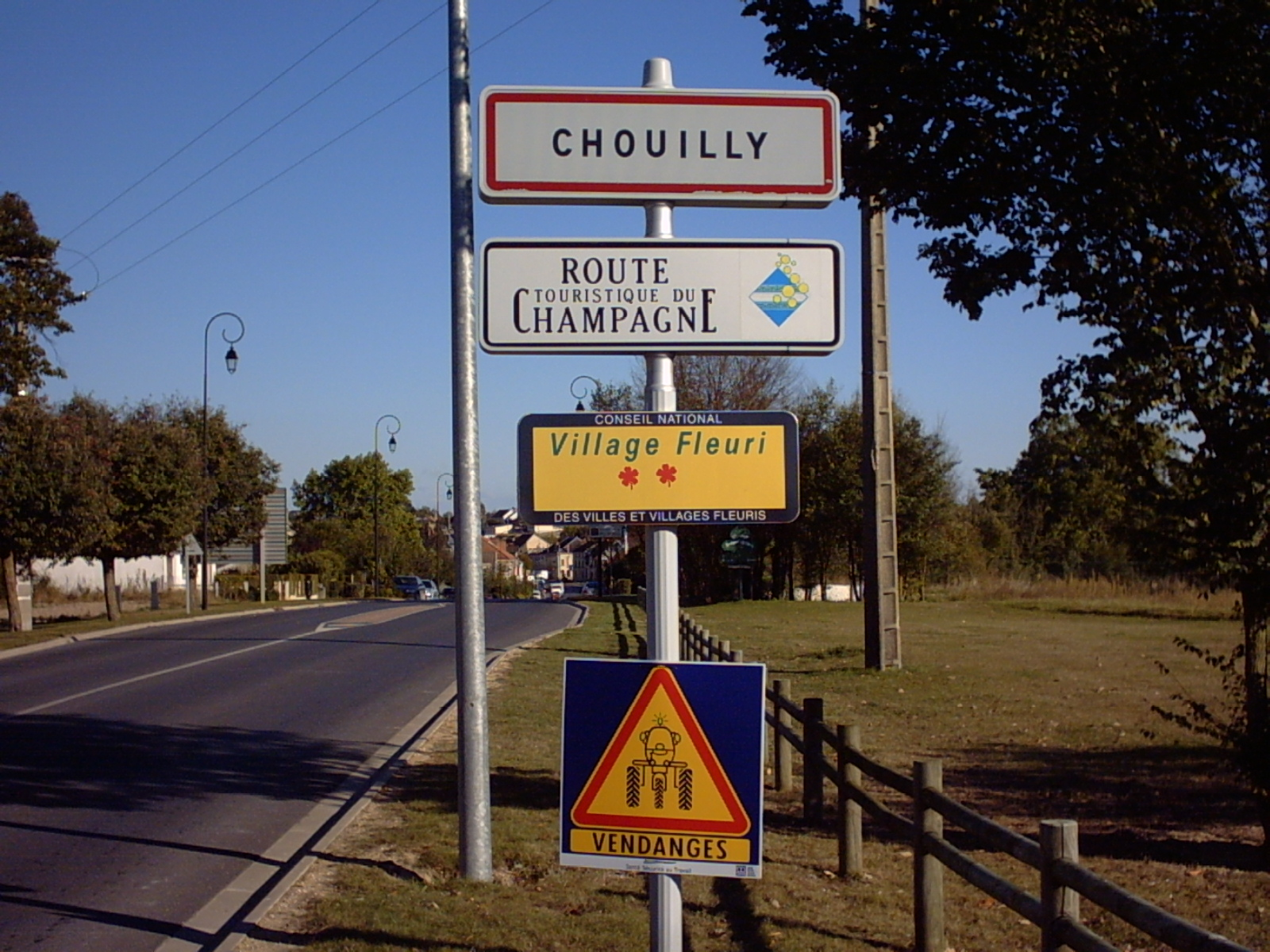 Entrée ouest de Chouilly (Marne).